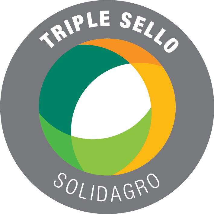 Logo Triple Sello argentino registrado en el INPI